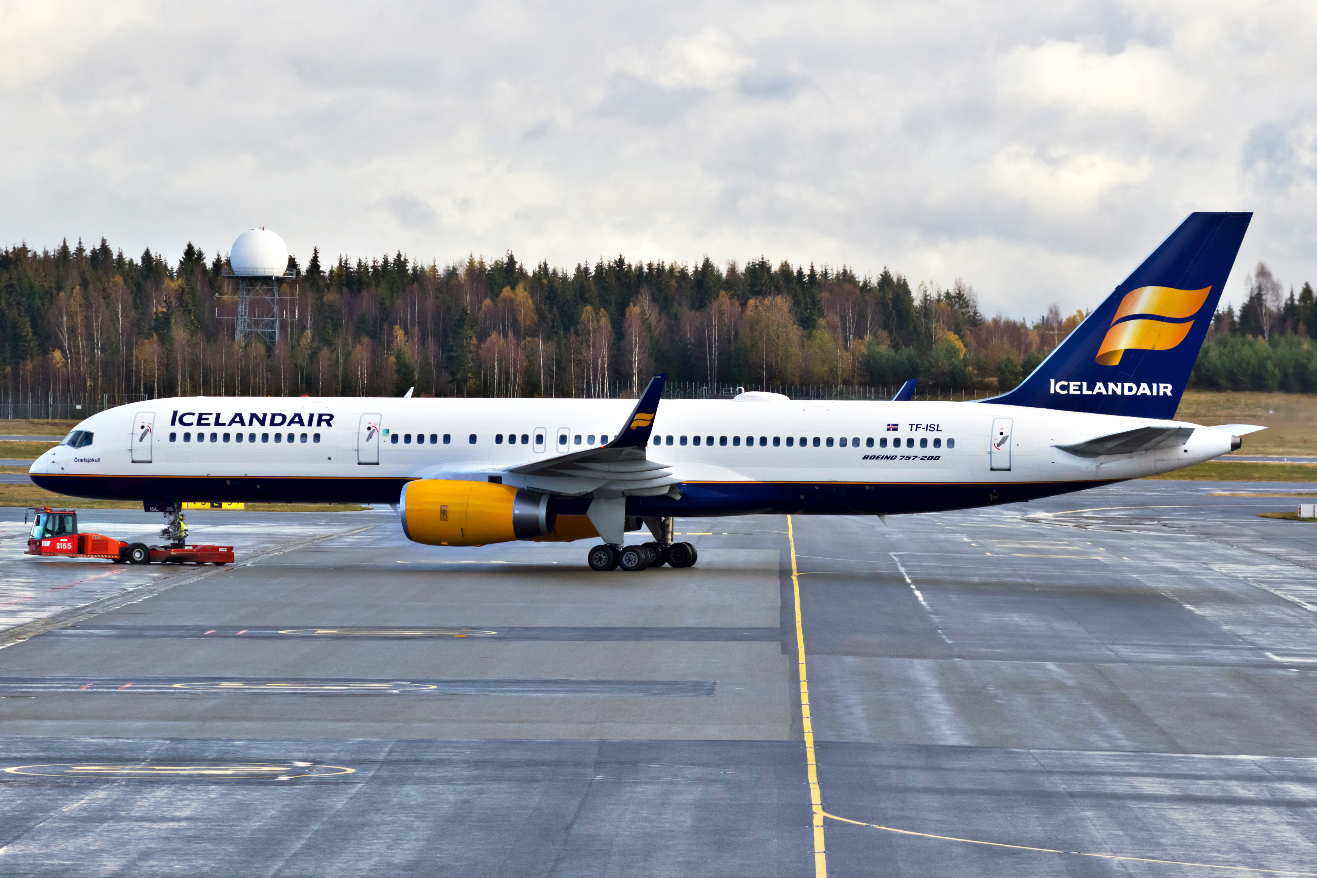 Boeing 757 de Icelandair abandonando a terminal no aeroporto de Oslo, Gardermoen.